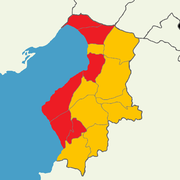 Hatay'da 2014 Türkiye cumhurbaşkanlığı seçimi